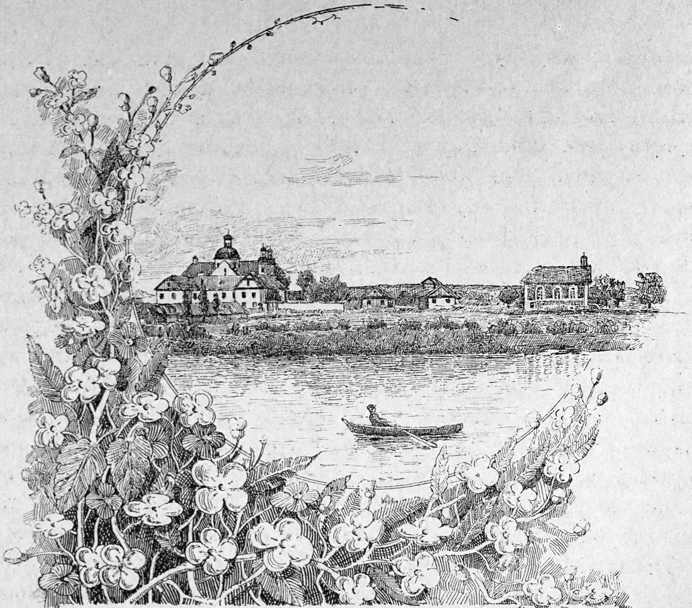 Беларуская (тарашкевіца): Беніца (Bienica). Агульны выгляд